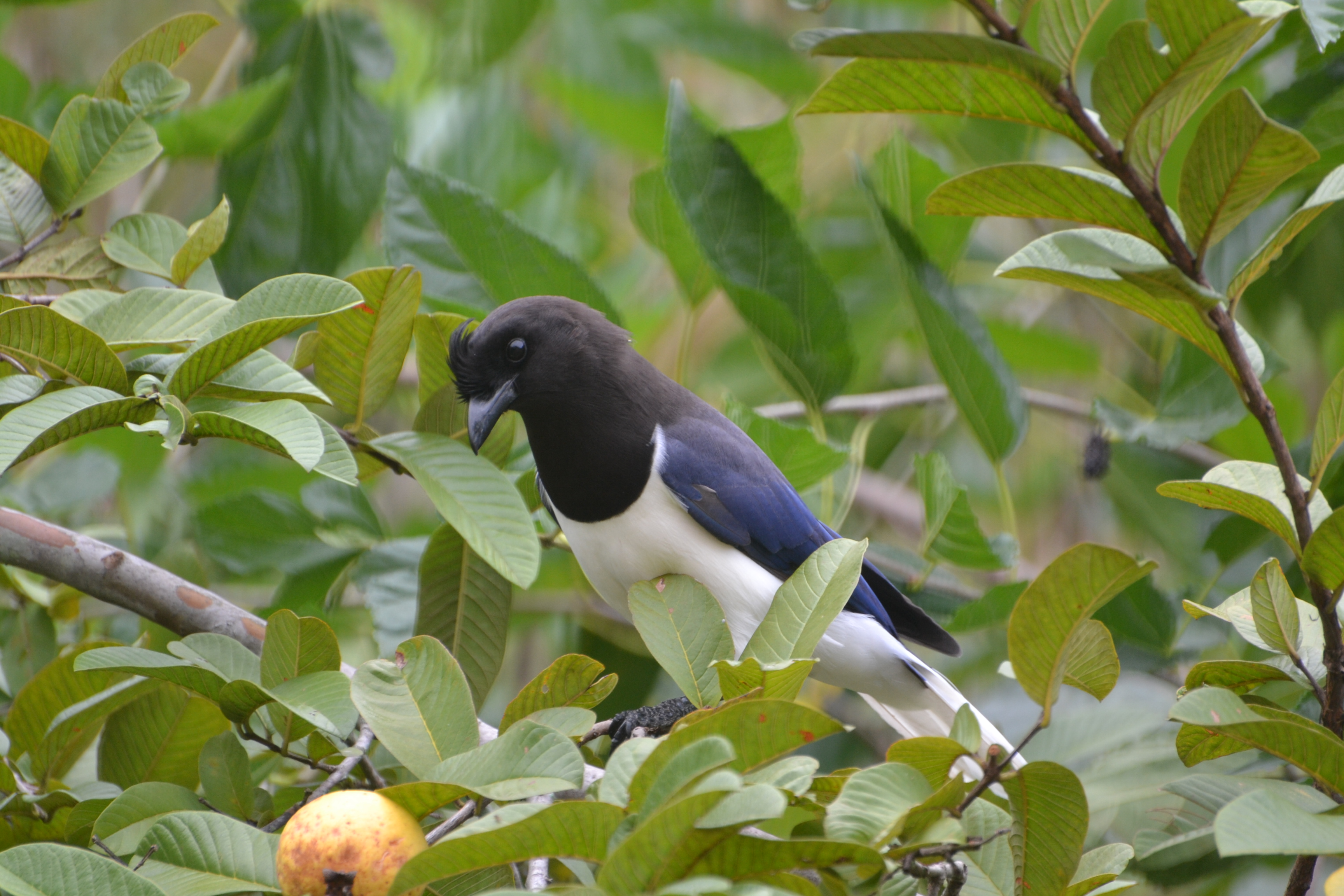 reserva ecológica barra mansa rio de janeiro